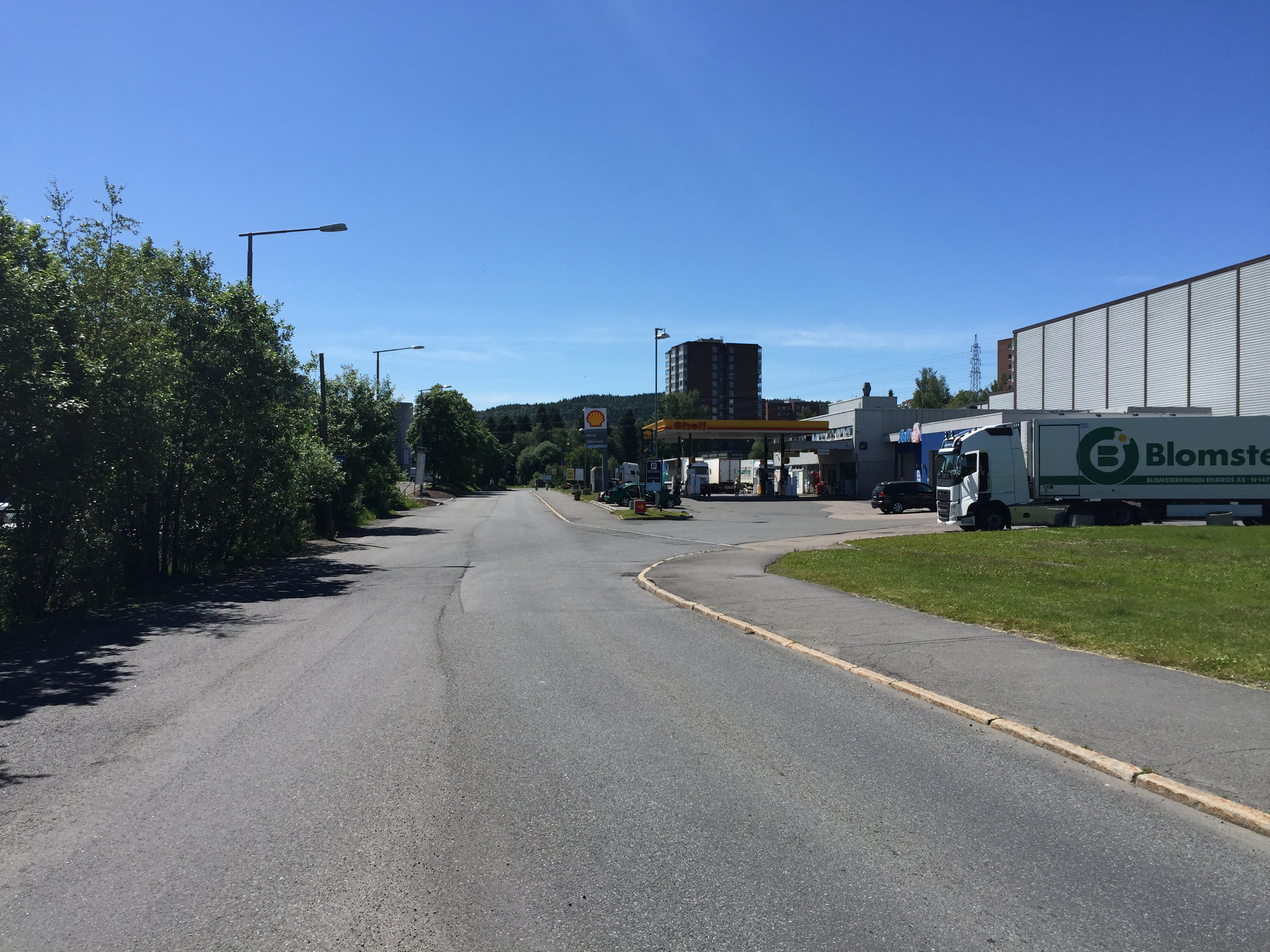 Per Krohgs vei i Oslo.